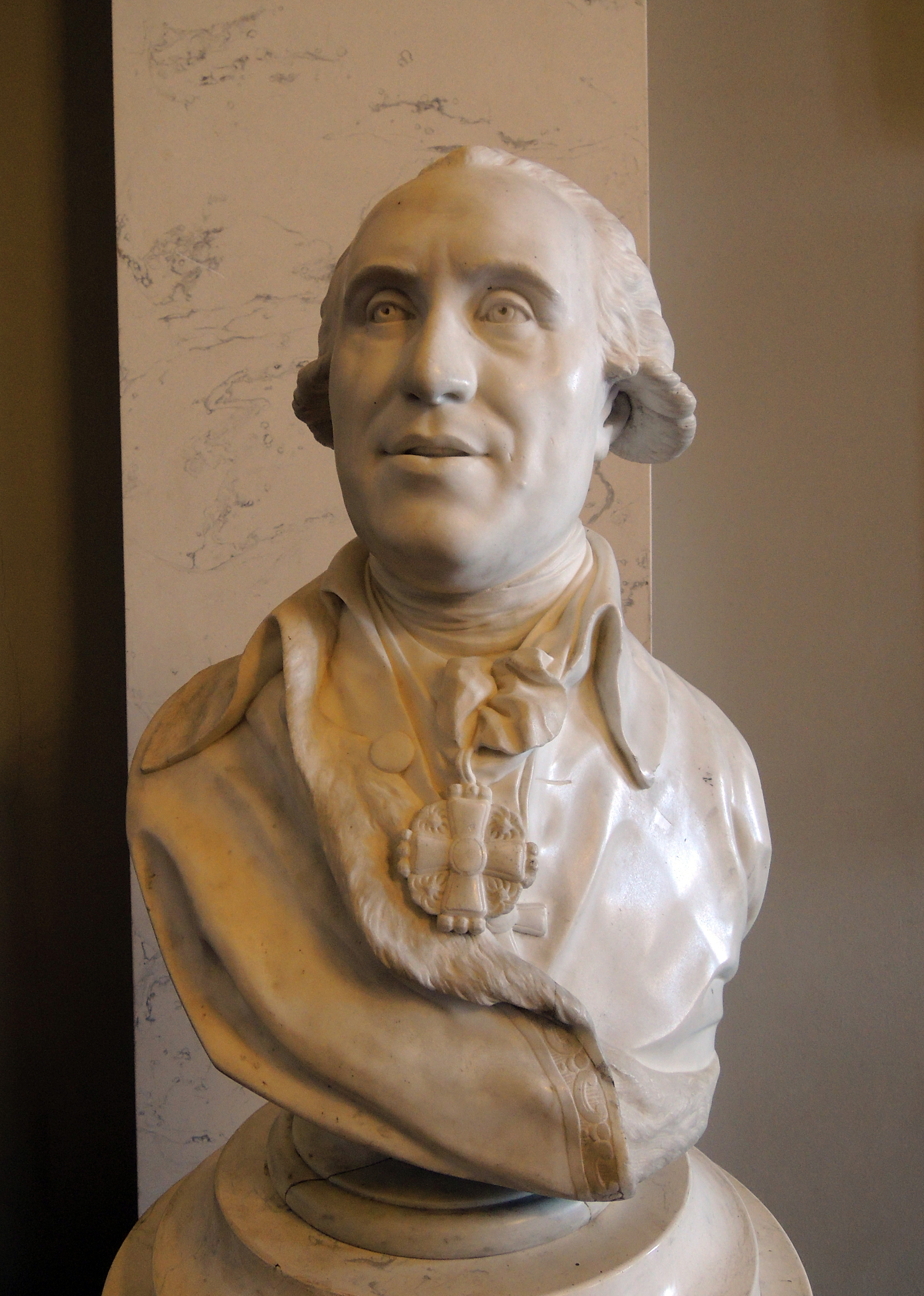 Ф. Шубин. «Портрет Е.М. Чулкова», 1792, ГРМ